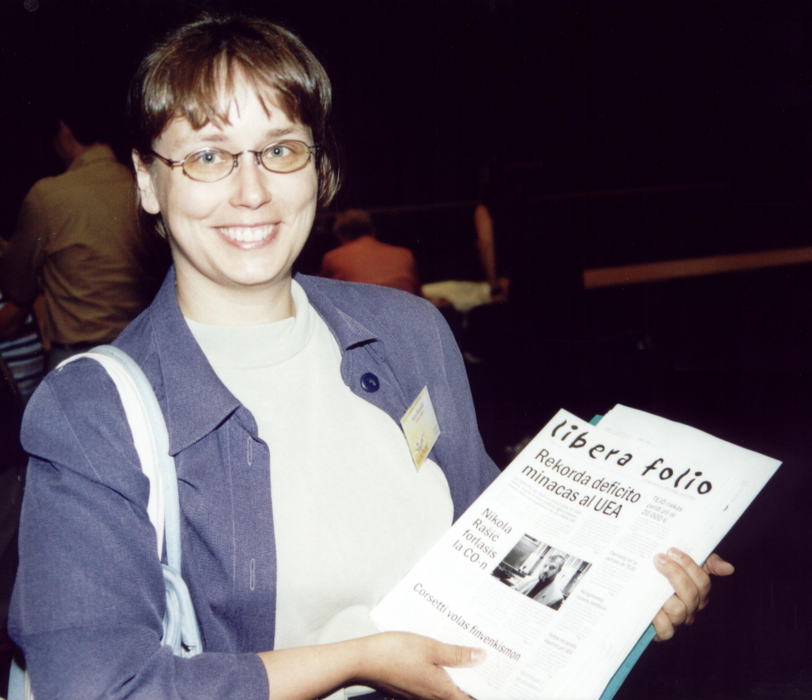 Universala Kongreso de Esperanto, Gotenburgo 2003. Anna Margerita Ritamäki, kun la unua numero de "Libera Folio". Ne disdonante, sed donante al petantoj.